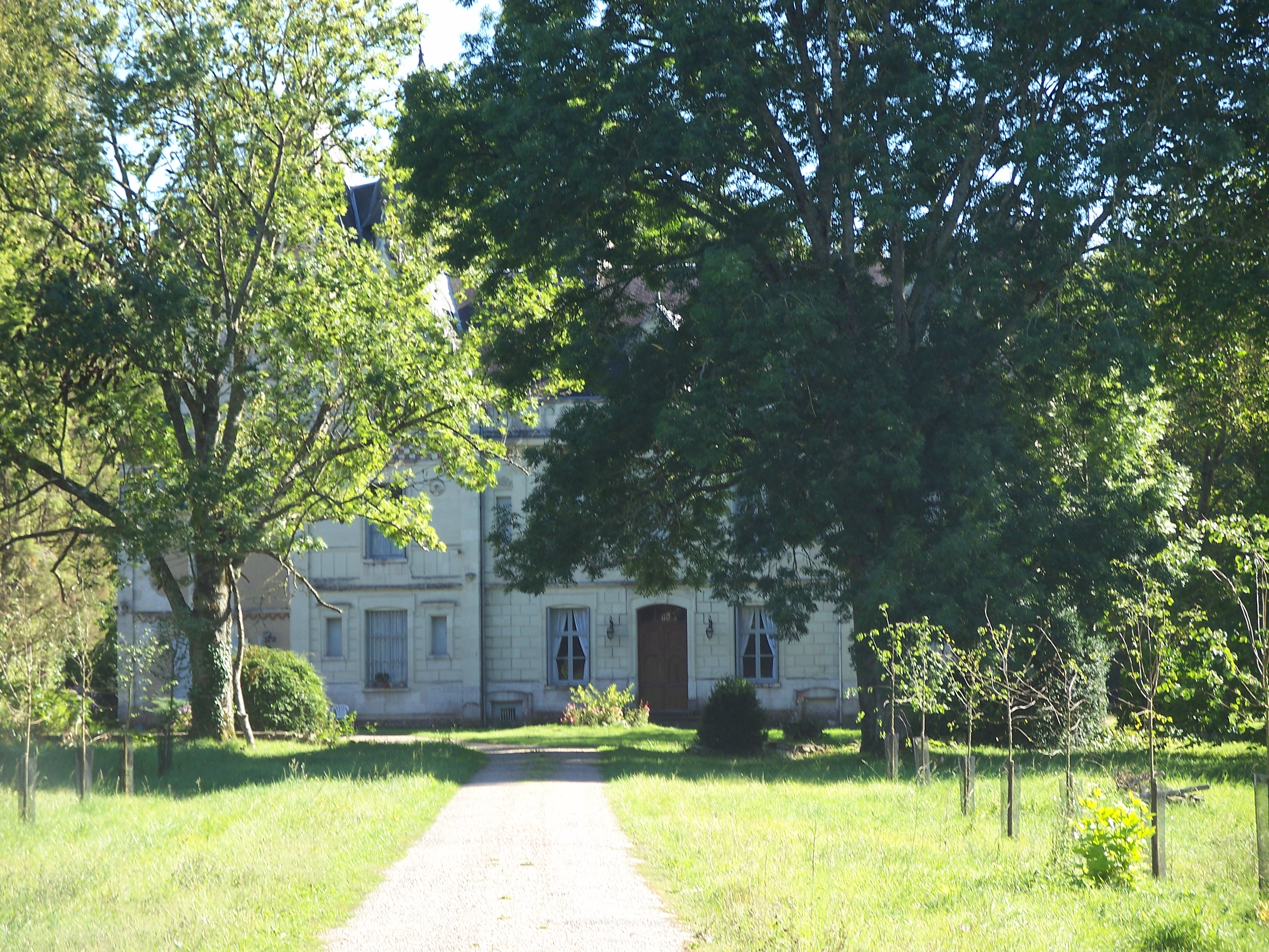 Château de Monthoiron (InscritClassé) .